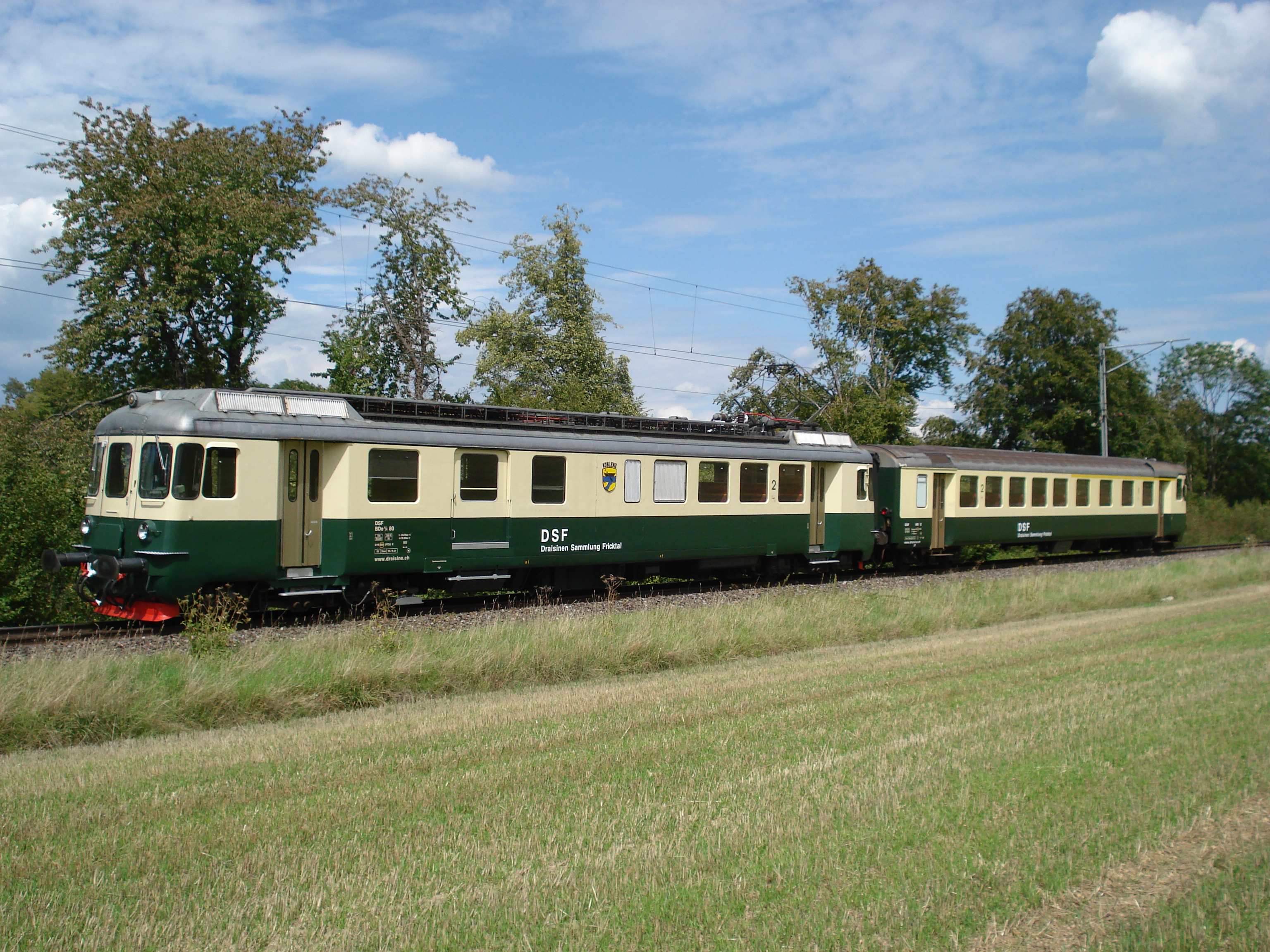 Hochleistungstriebwagen BDe 4/4 80 mit dem Steuerwagen ABt 12 des Vereins Depot und Schienenfahrzeuge Koblenz (DSF) ehemals Schweizerische Südostbahn (SOB).